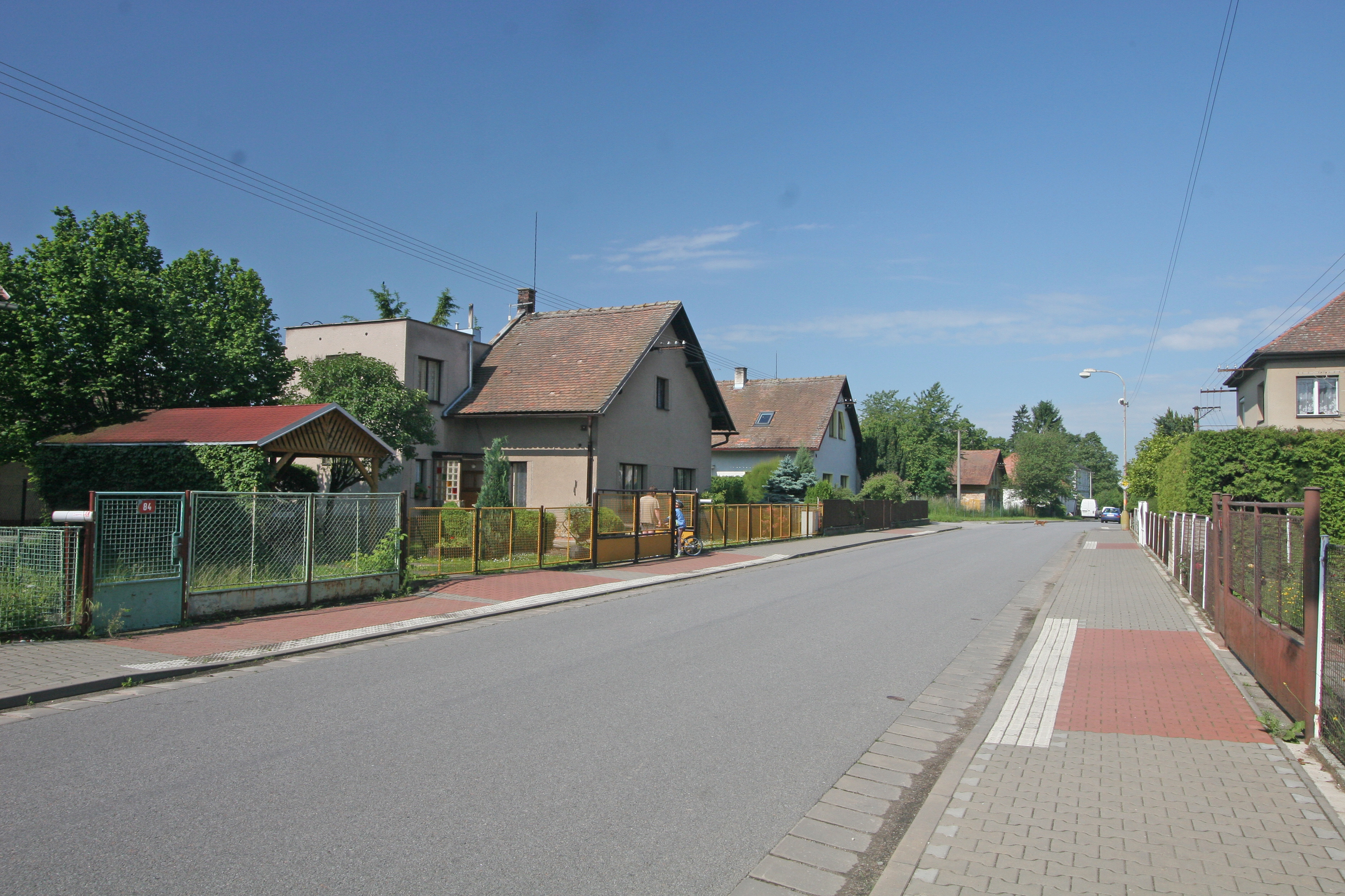 Starý Mateřov čp. 84